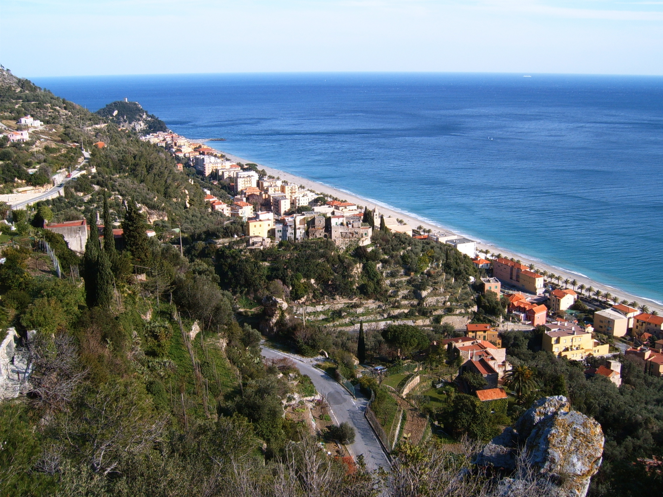 Varigotti (Riviera ligure di ponente, Liguria, Italia)